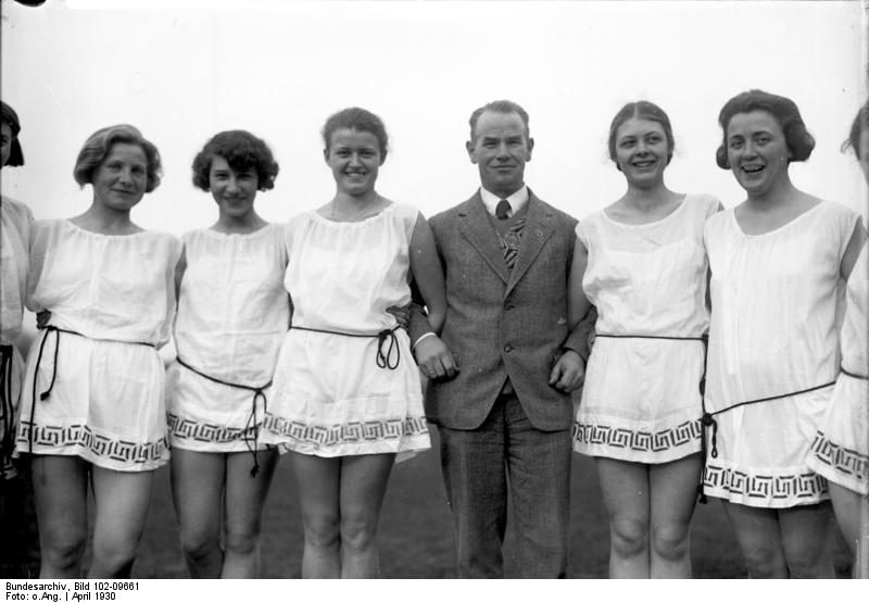 Moderner deutscher Frauensport! In der Logis-Schule in Hannover werden Frauen und Mädchen durch rythmischen Sport zu moderner Körperertüchtigung ausgebildet. Früh um 8 Uhr beginnen bei schönem Wetter die rythmischen Uebungen im Tanzen und Springen, um den Körper Grazie und Anmut zu verleihen. Der Gründer der Logis-Schule, Herr Logis mit einigen seiner Schülerinnen.